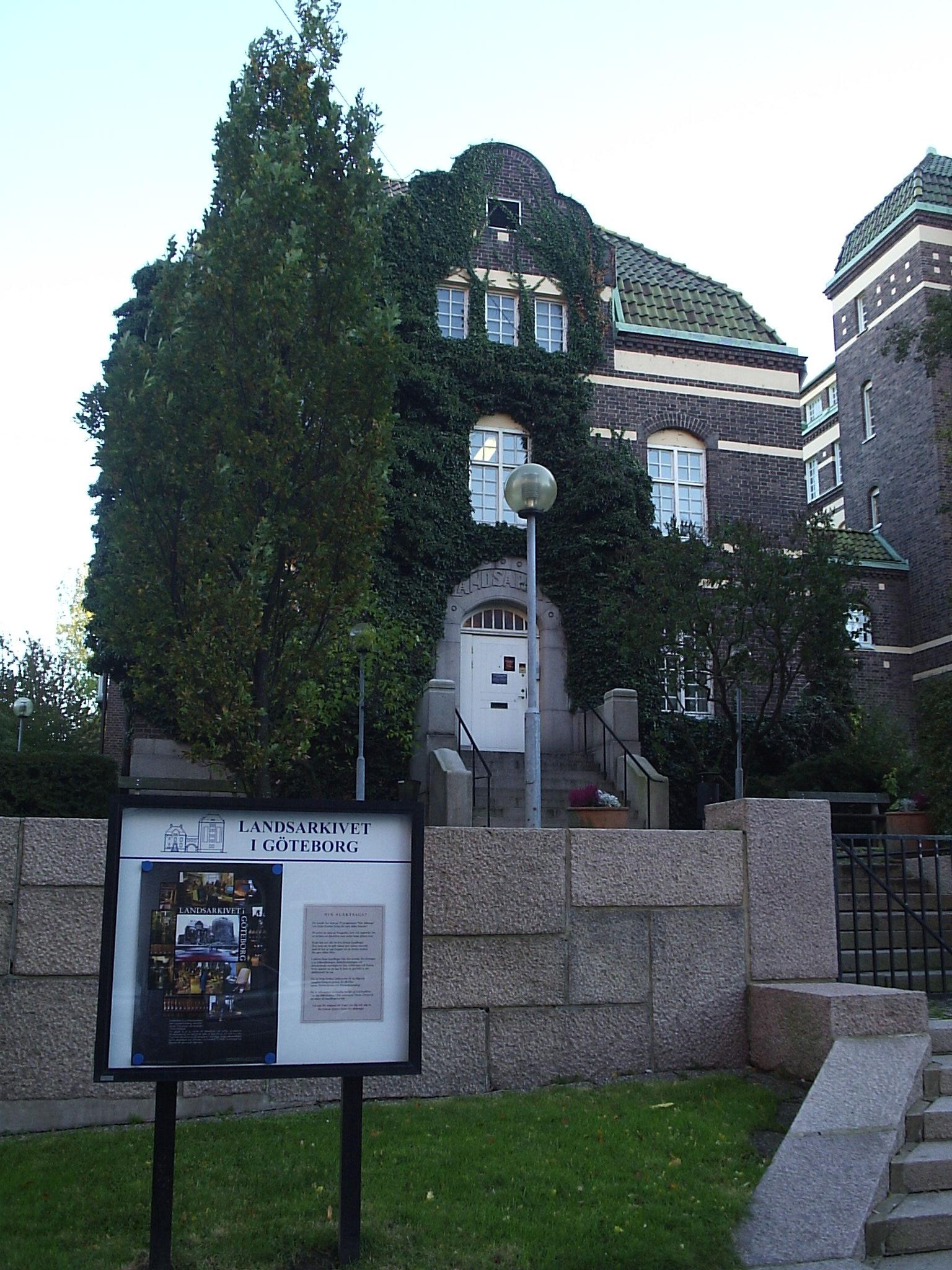 Landsarkivet i Göteborg, den 28 oktober 2005, fotograferad av Harri Blomberg.